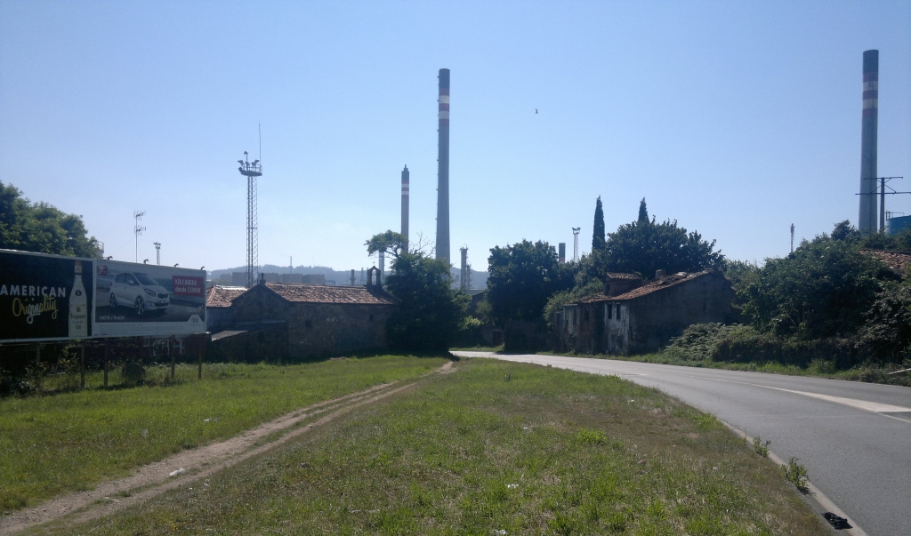 San Xosé, A Coruña.